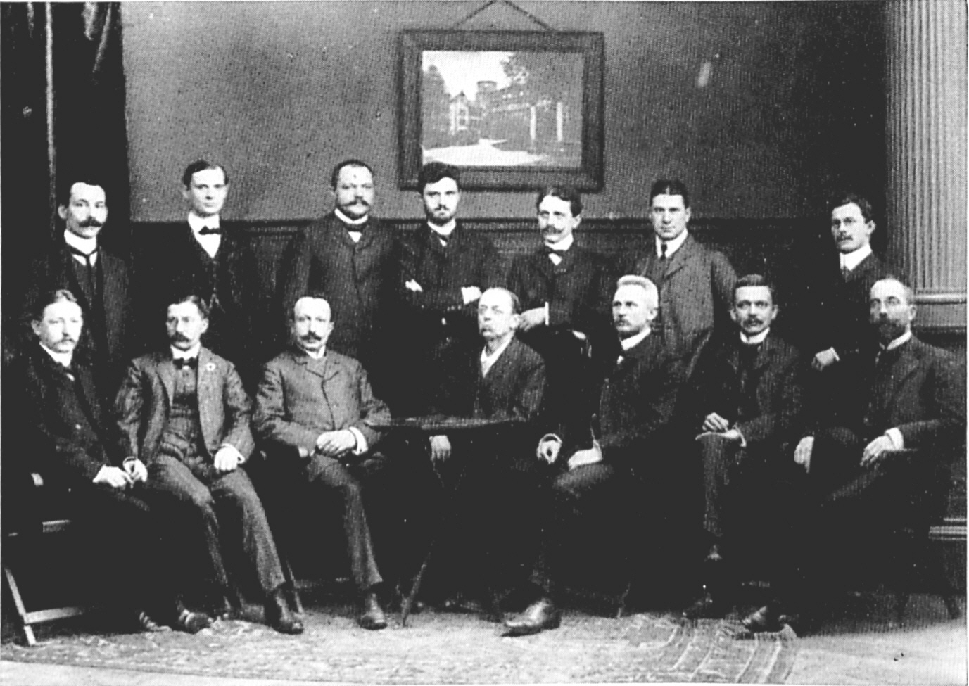 Hochschullehrer Chemie Heidelberg, vermutlich 60. Geburtstag von Jannasch stehend, vlnr: Erich Ebler (* 8. März 1880 in Mannheim; † 23. Januar 1922 in München) Hartwig Franzen (* 21. März 1878 in Nortorf; † 14. Februar 1923 in Karlsruhe) Otto von Mayer (* 13.11.1872) August Darapsky (* 3. Mai 1874 in Mainz; † 26. April 1942 in Aschaffenburg)[1] Ernst Muckermann (* 15.11.1874) Felix Fränckel (* 13.5.1878) Ernst Müller (* 18.2.1881) sitzend, vlnr: Johannes Rissom (1868-1954) August Klages (* 19. Juni 1871 in Hannover; † 27. Dezember 1957 in Göttingen) Georg Bredig (* 1. Oktober 1868 in Glogau; † 24. April 1944 in New York) Paul Jannasch (* 2. Oktober 1841 in Deutsch-Ossig/Görlitz; † 20. März 1921 in Heidelberg)[2] Emil Knoevenagel (* 18. Juni 1865 in Linden bei Hannover; † 11. August 1921 in Berlin) Ernst Mohr (* 30. Mai 1873 – 1926) Robert Stollé (1869-1938)